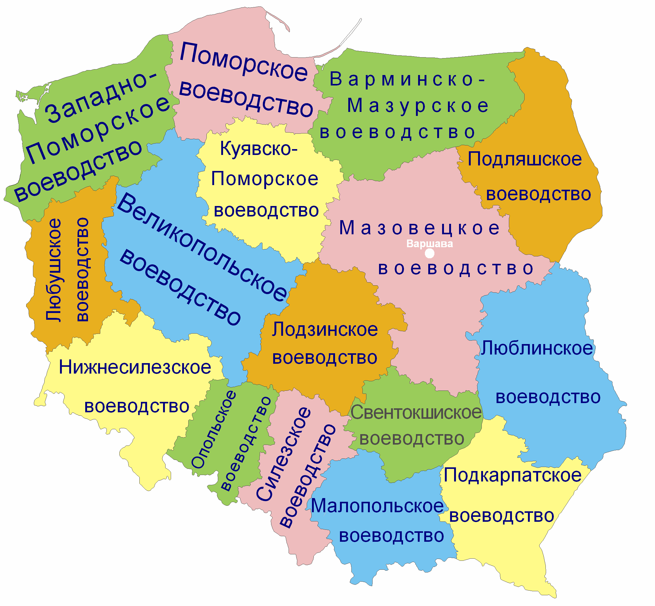 Воеводства Польши с русскими наименованиями